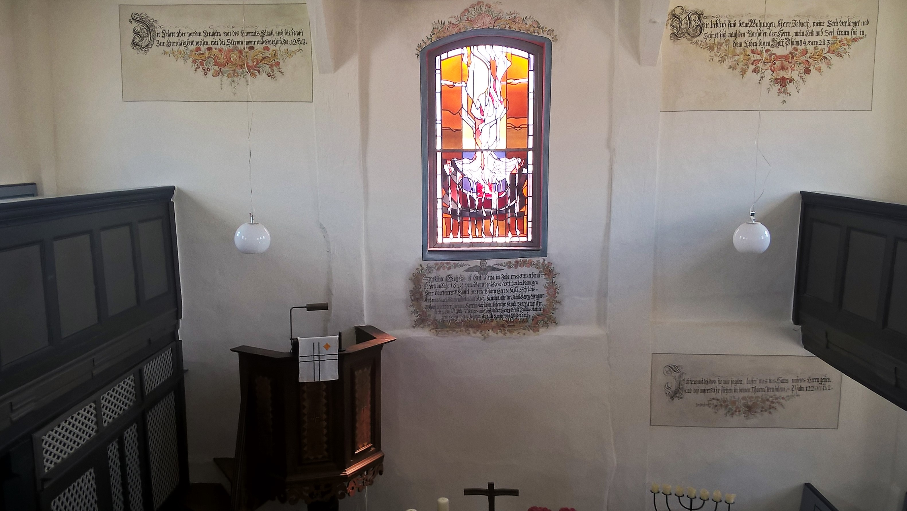 Evangelische Kirche Runzhausen (Gladenbach), Landkreis Marburg-Biedenkopf, Hessen, Deutschland